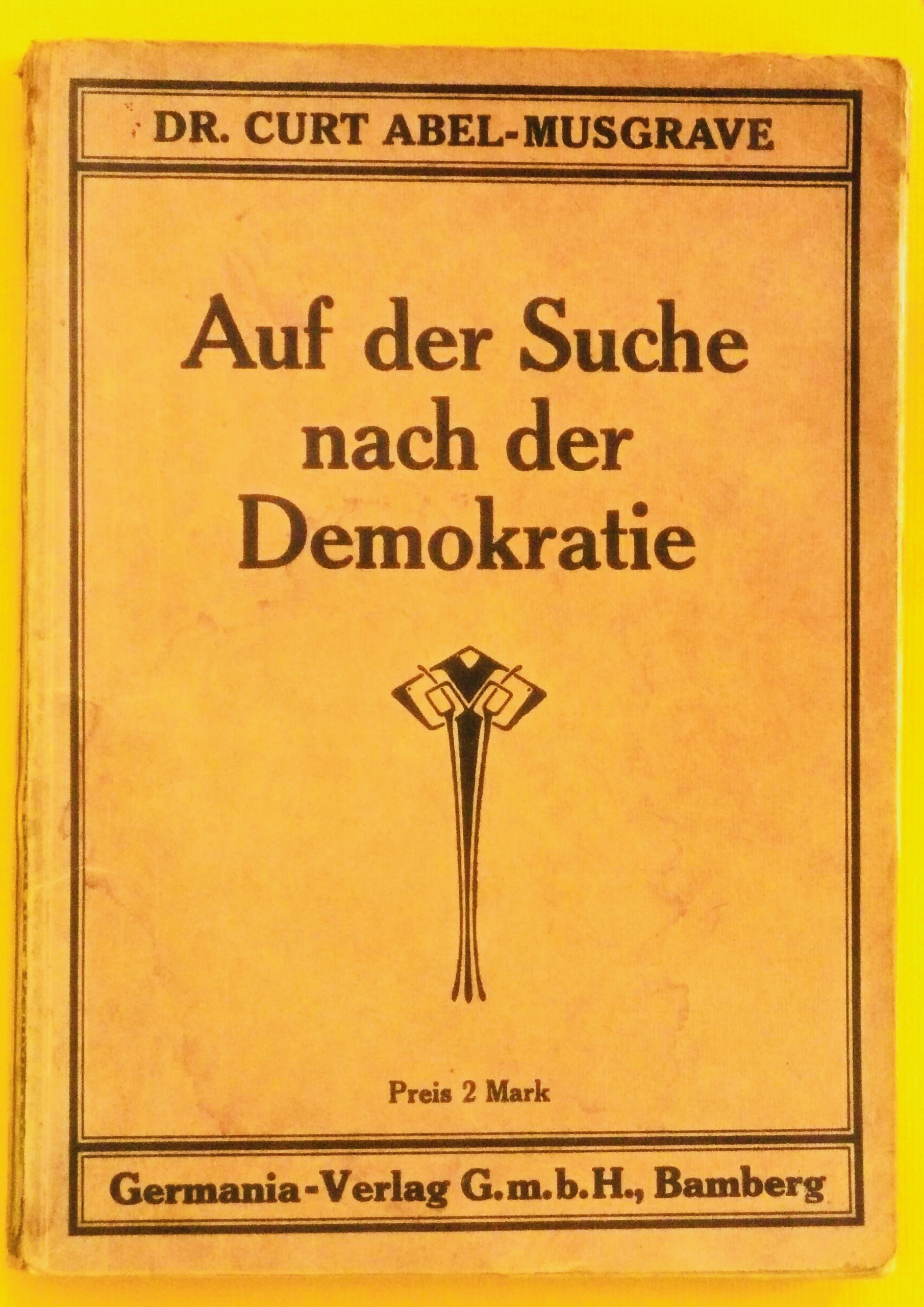 Curt Abel-Musgrave (1860–1938): Op zoek naar democratie, Uitgeverij Germania, Bamberg 1914